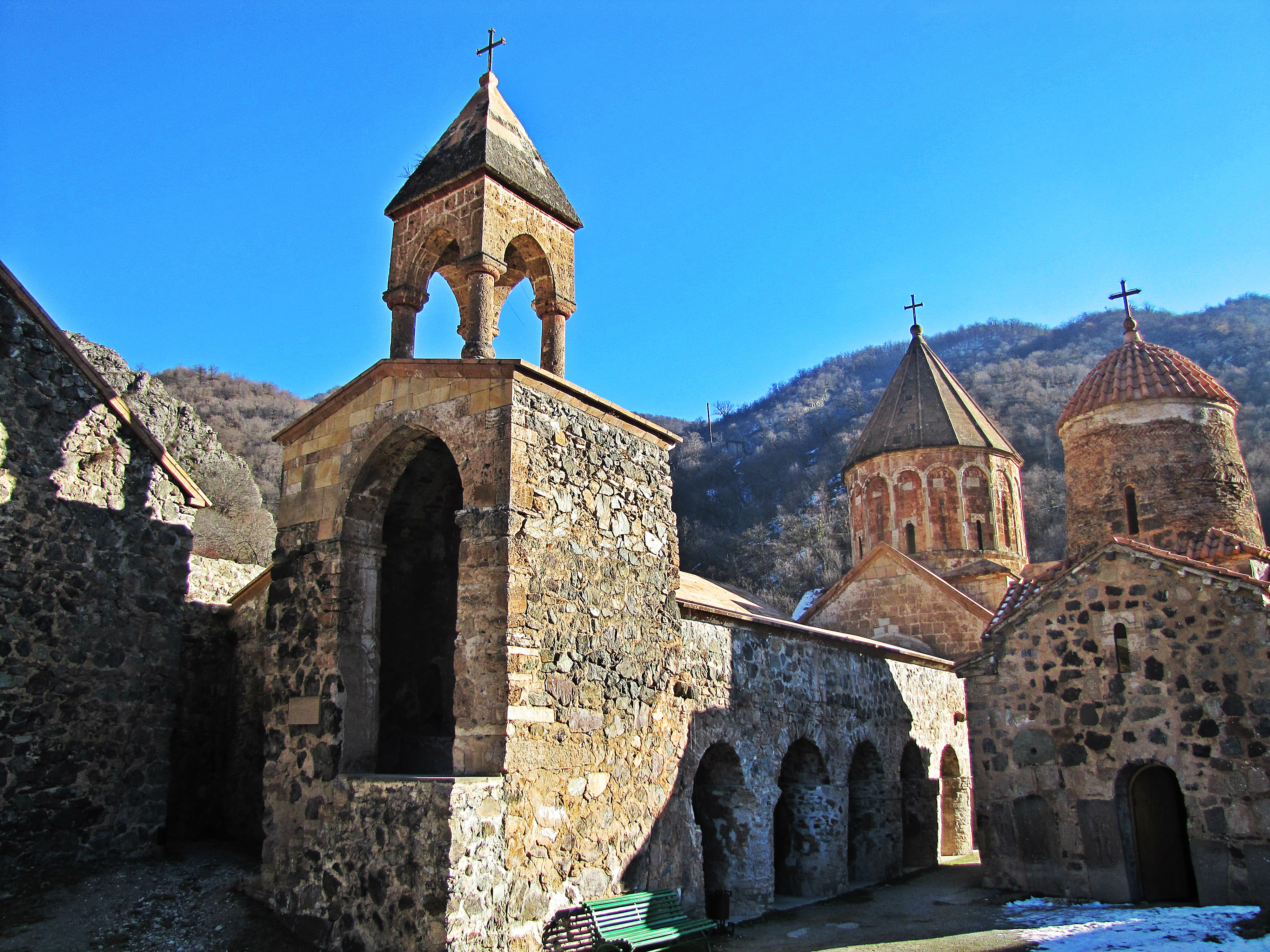 Դադիվանք